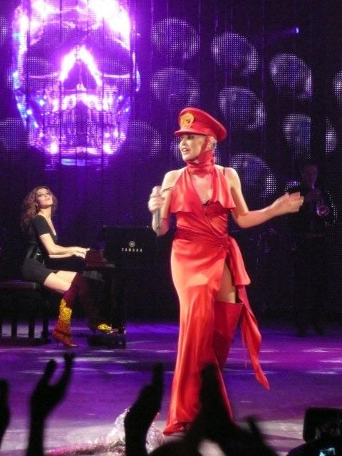 KylieX2008